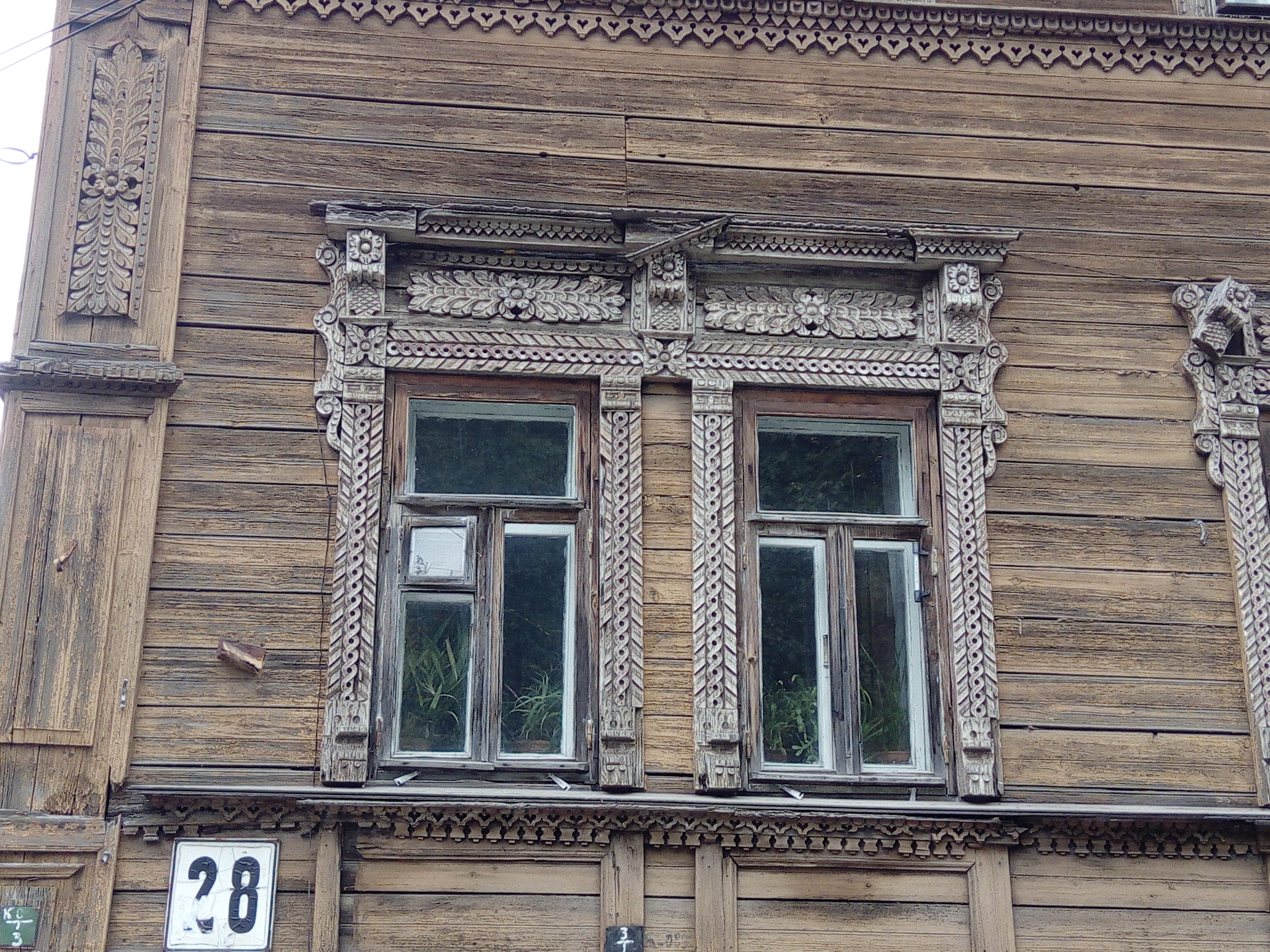 Жилой дом: улица Ковалихинская, 28, Нижний Новгород, Нижегородская область